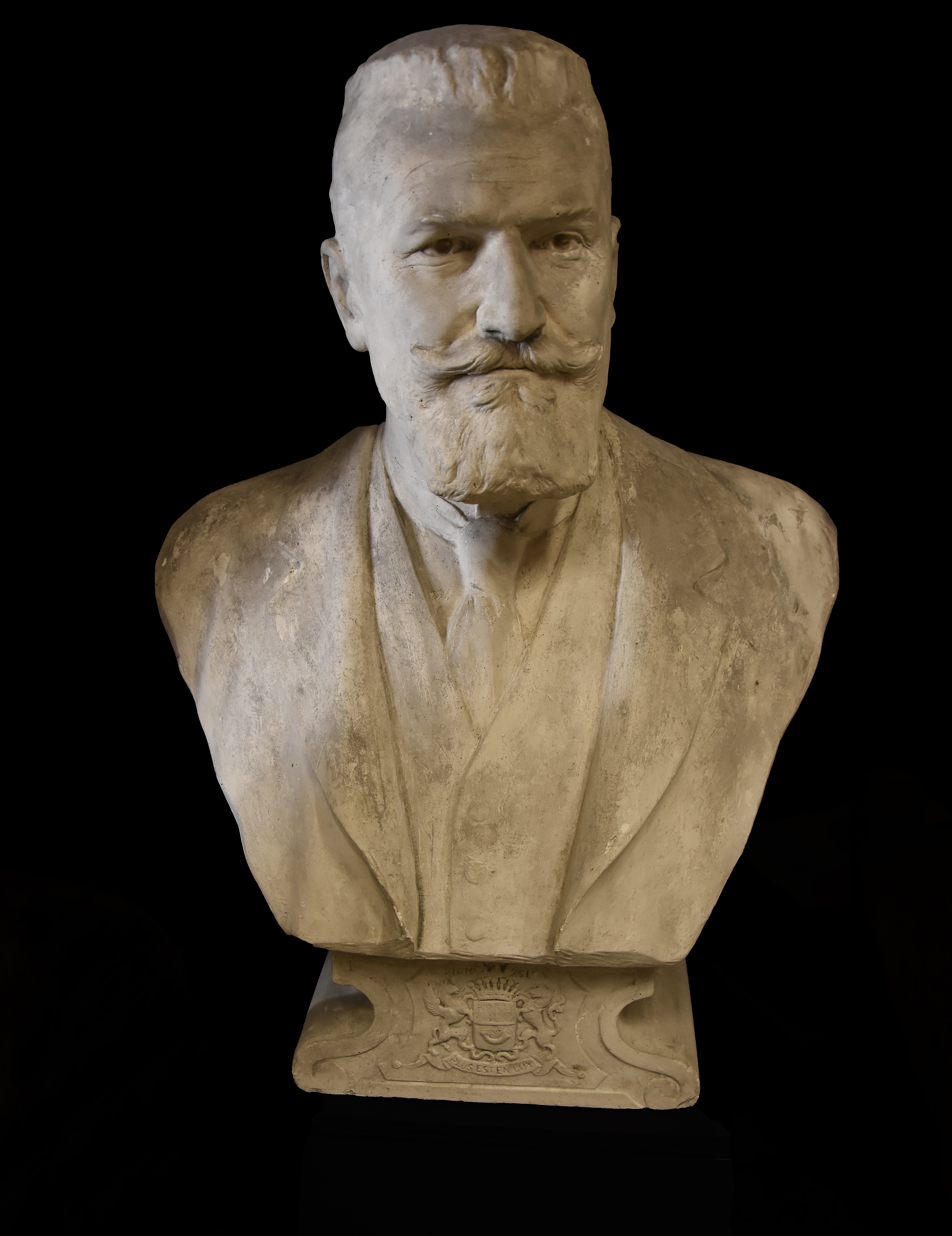 Jules Vits (1868-1935), beeldhouwer : Leon van Pottelsberghe de la Potterie (1867-1946) - Oud-burgemeester van Melle - Gemeentelijk Museum Melle.